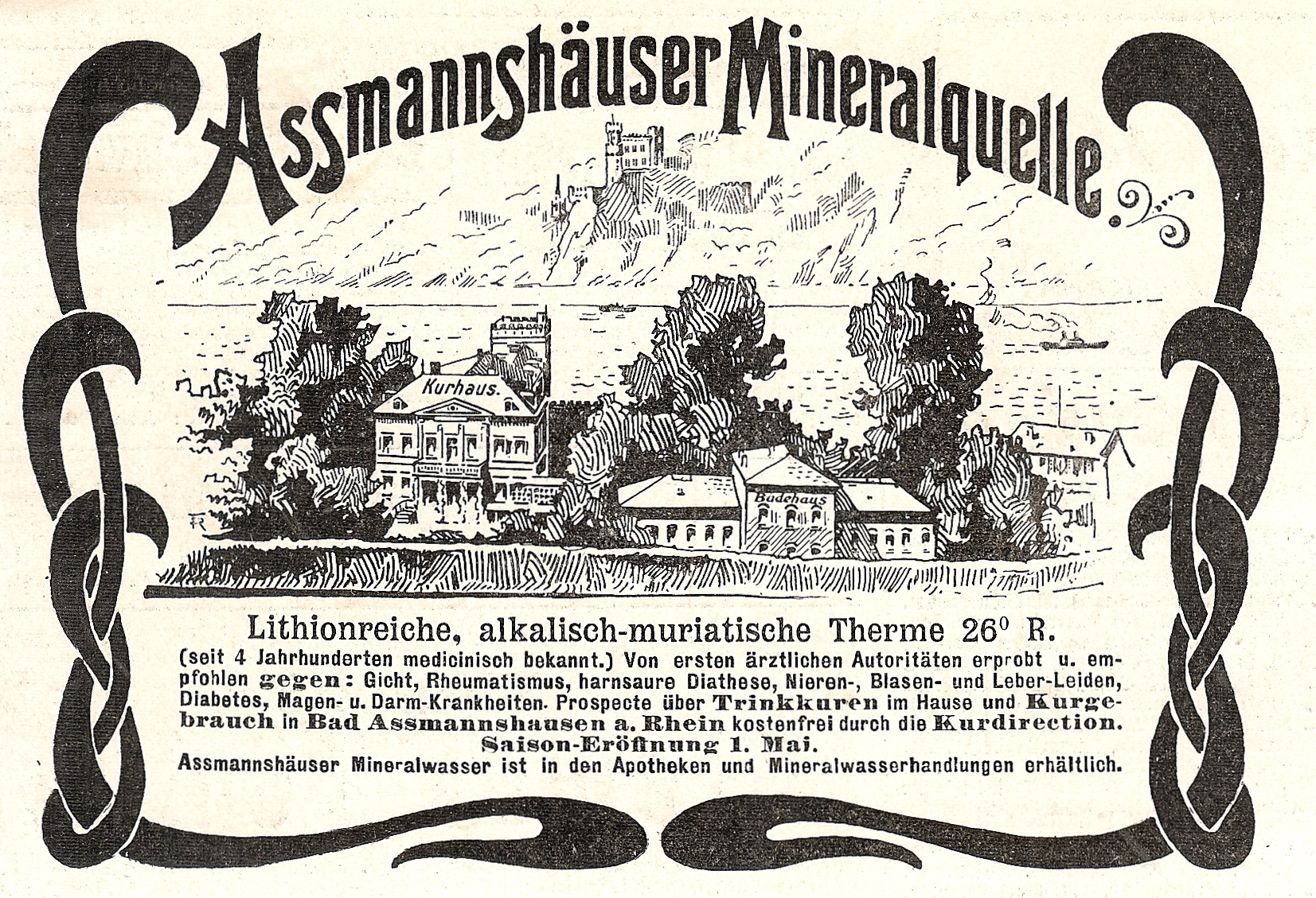 Werbeanzeige aus einer Zeitschrift von 1899 für die "Lithionreiche, alkalisch-muriatische" Assmannshäuser Mineralquelle (auch Graf-Adolph-Quelle oder ASS-Brunnen). Bild: Kurhaus Assmannshausen, Rheingau.